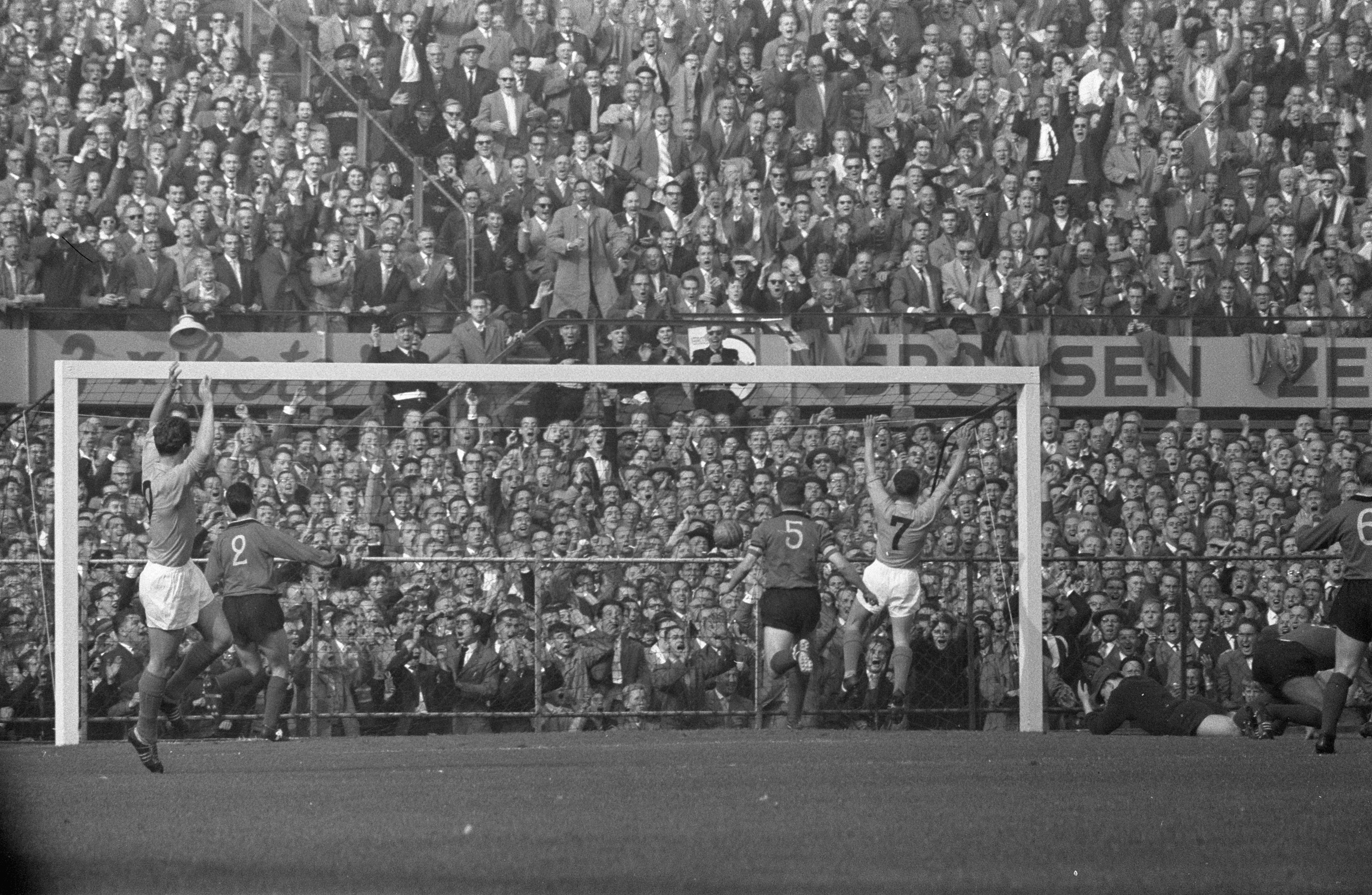 Collectie / Archief : Fotocollectie Anefo Reportage / Serie : [ onbekend ] Beschrijving : Nederland tegen Belgie 9-1, Piet van der Kuil maakt doelpunt Datum : 4 oktober 1959 Locatie : Rotterdam, Zuid-Holland Trefwoorden : sport, voetbal Persoonsnaam : Kuil Piet Van Der Instellingsnaam : Nederlands Elftal Fotograaf : Rossem, Wim van / Anefo Auteursrechthebbende : Nationaal Archief Materiaalsoort : Negatief (zwart/wit) Nummer archiefinventaris : bekijk toegang 2.24.01.05 Bestanddeelnummer : 910-7237